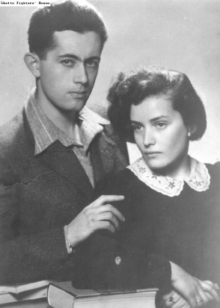 שמשון וגוסטה דרנגר